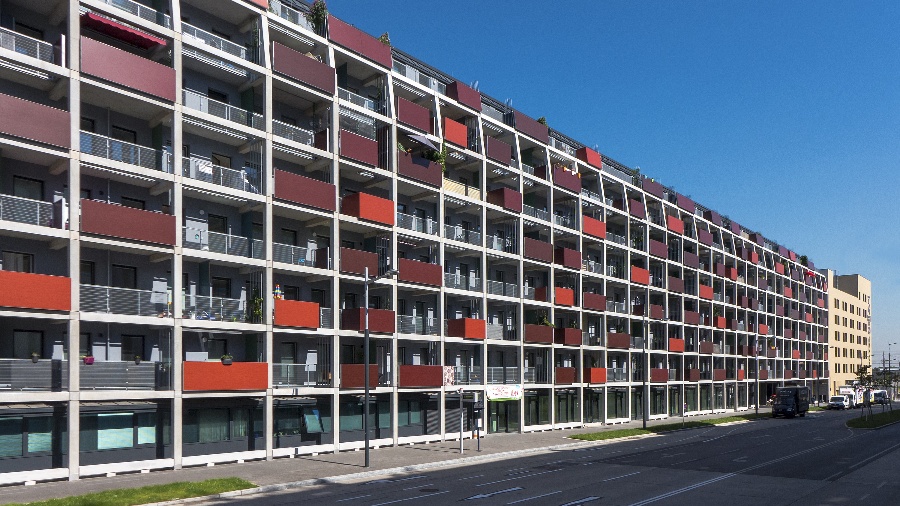 Sonnwendviertel in Wien 10 bei der Alfred-Adler-Straße